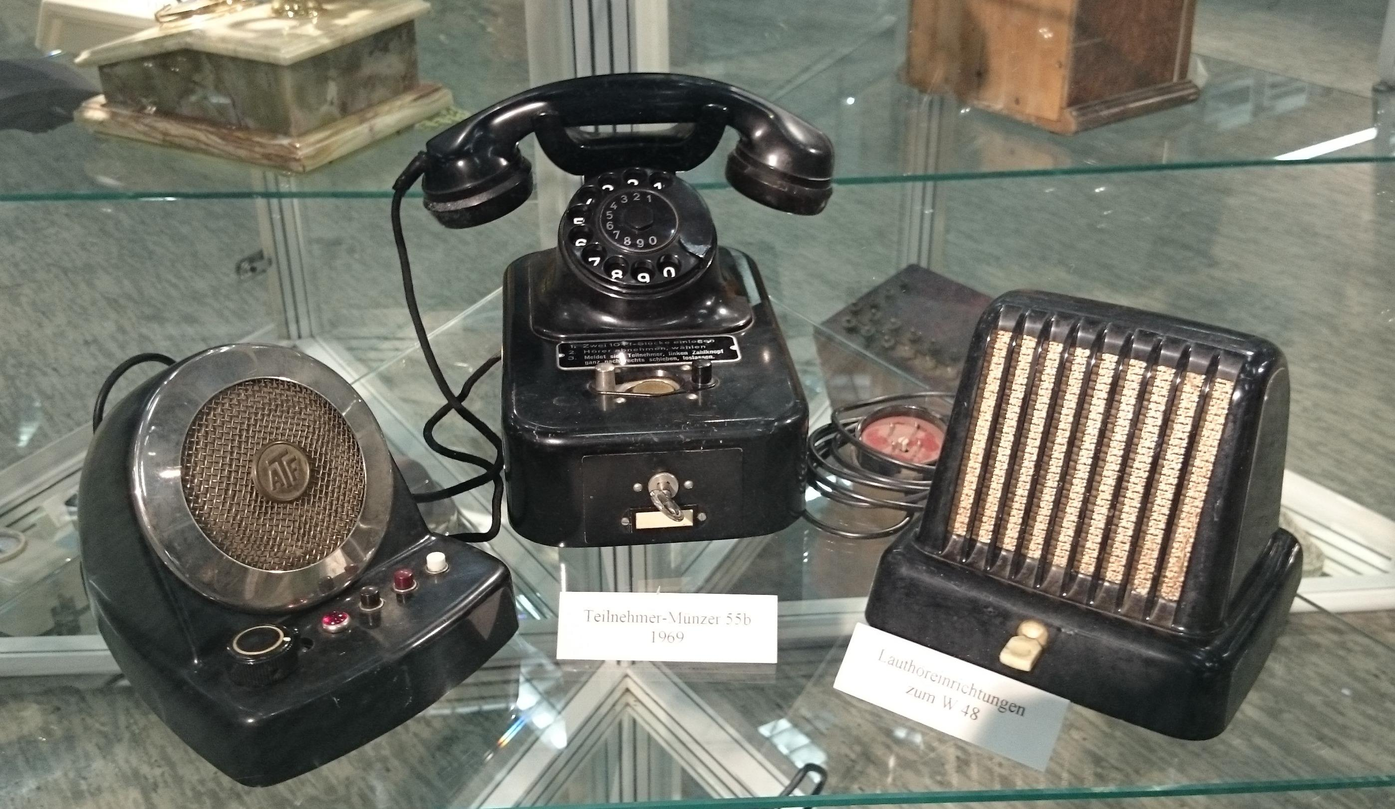 Lauthöreinrichtungen und Münztelefone im Fernmeldemuseum Aachen